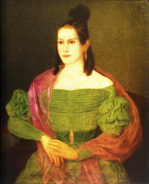 Екатерина Ермолаевна Керн (1818 — 1904)